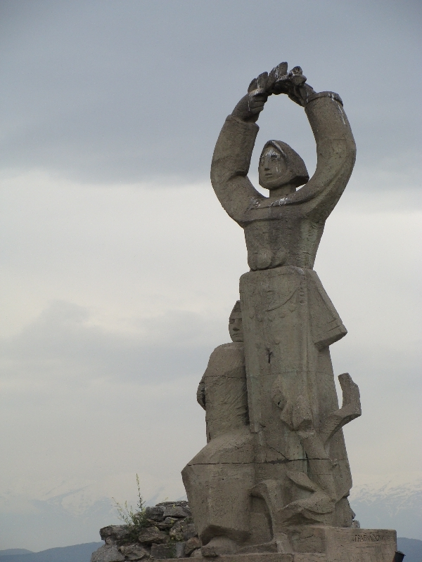 Kale, Skopje